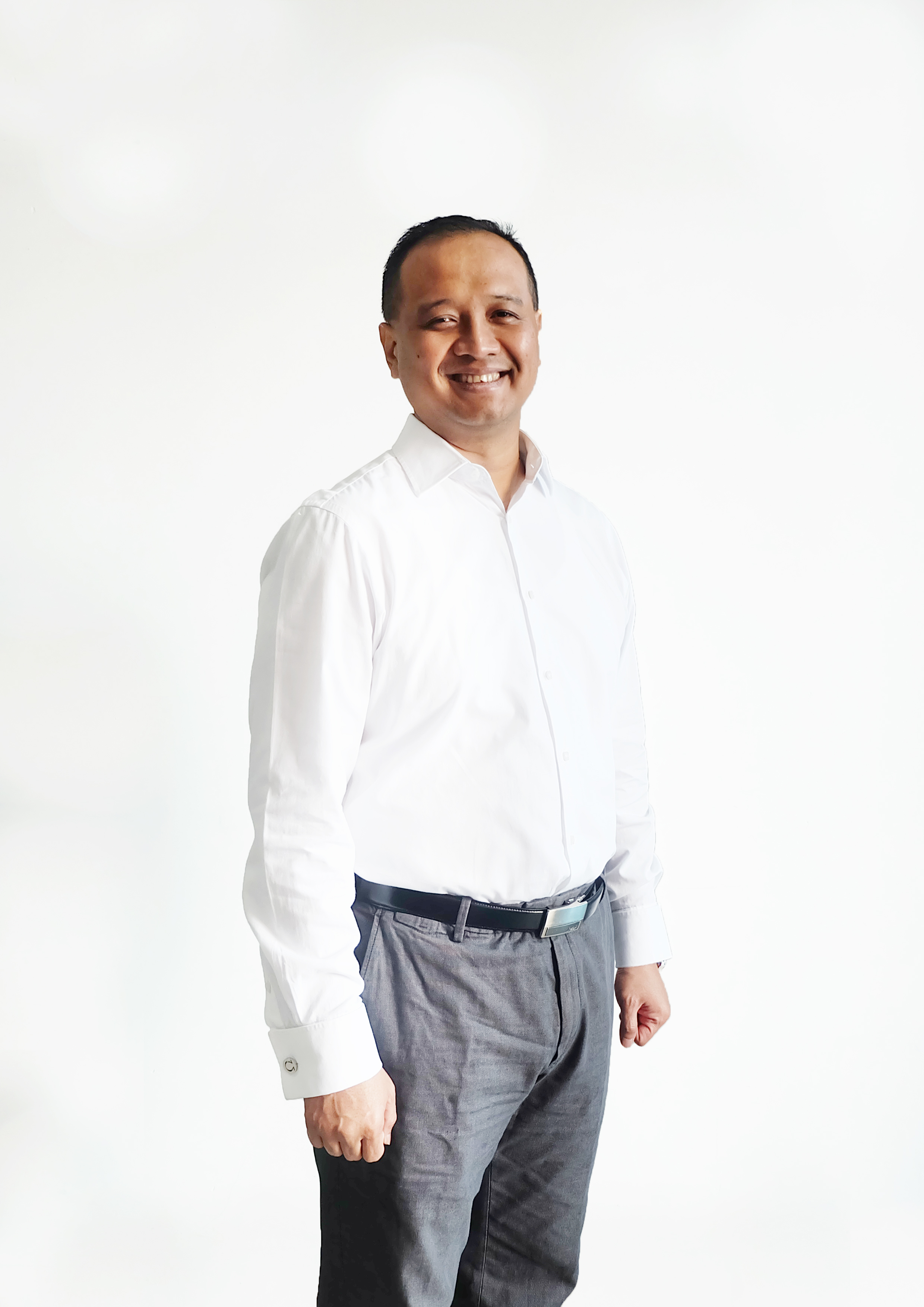 Direktur Utama PT Transjakarta